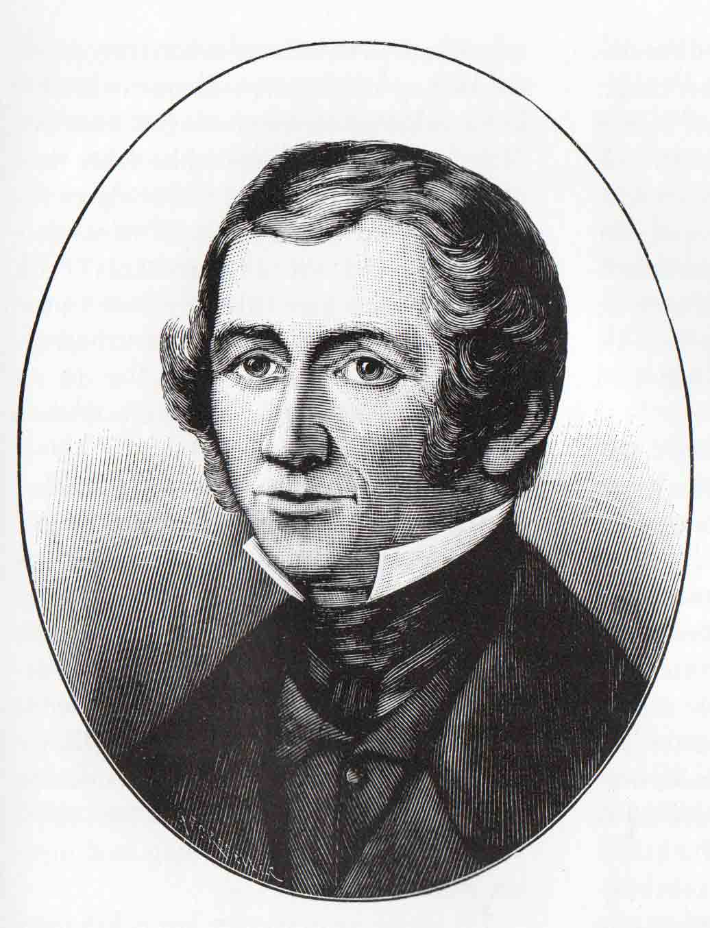 Torsten Rudenschöld (1798-1859)